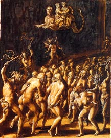 Divina Commedia, Inferno, Canto 17